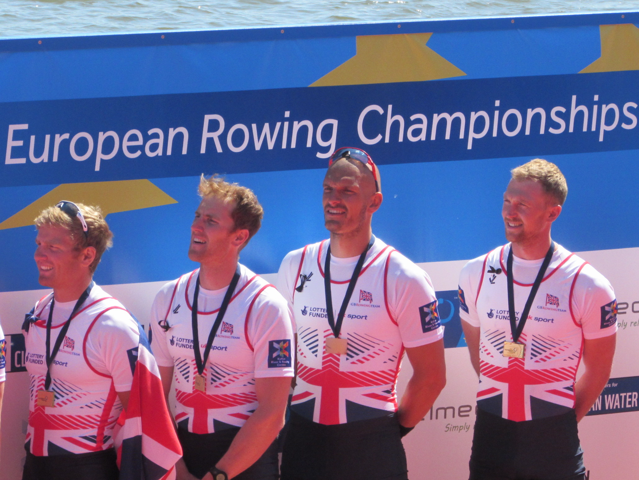 Alex Gregory, Mohamed Sbihi, George Nash, Constantine Louloudis, Ruder-EM 2016